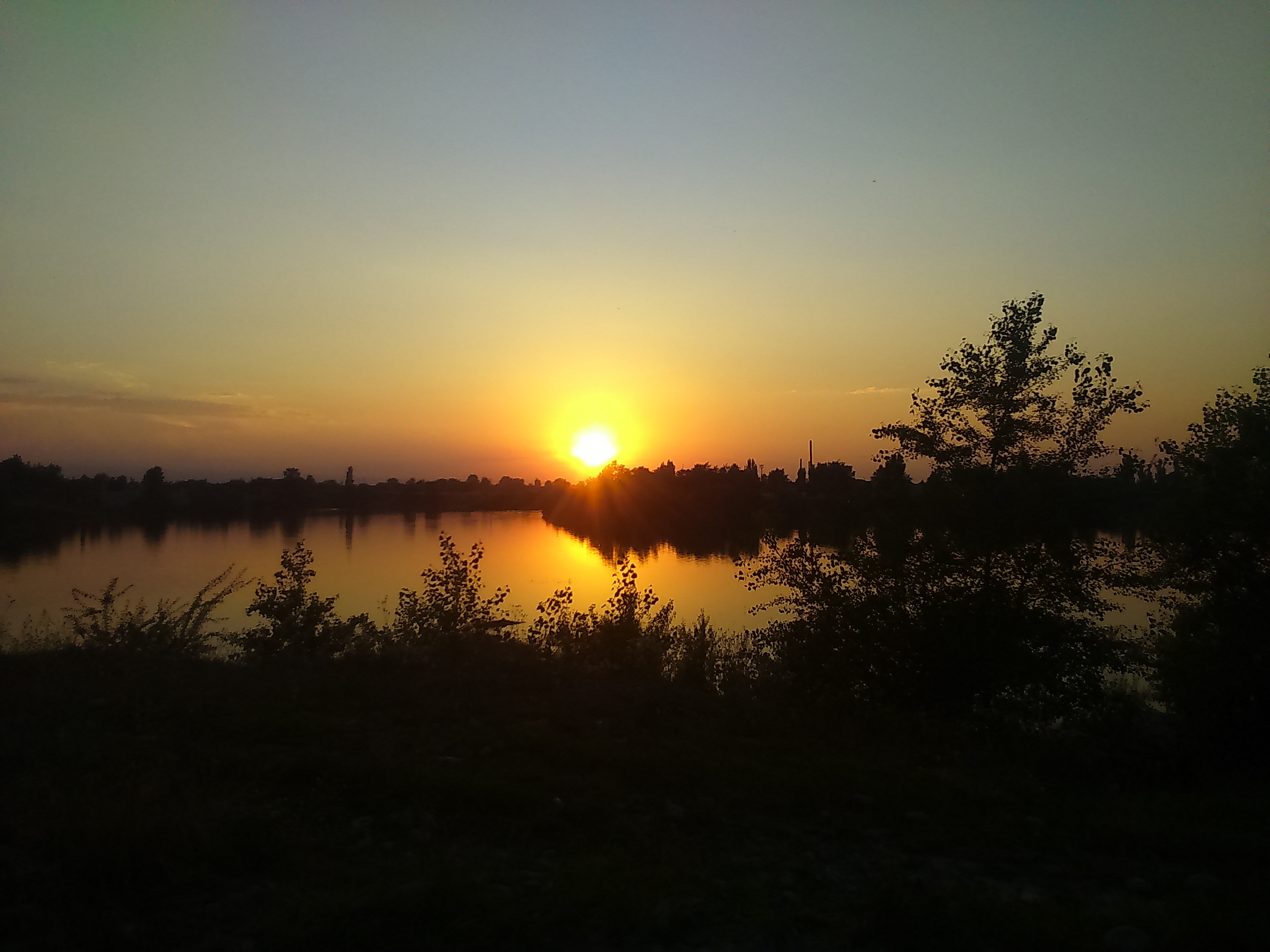 Закат над черекской карьерой